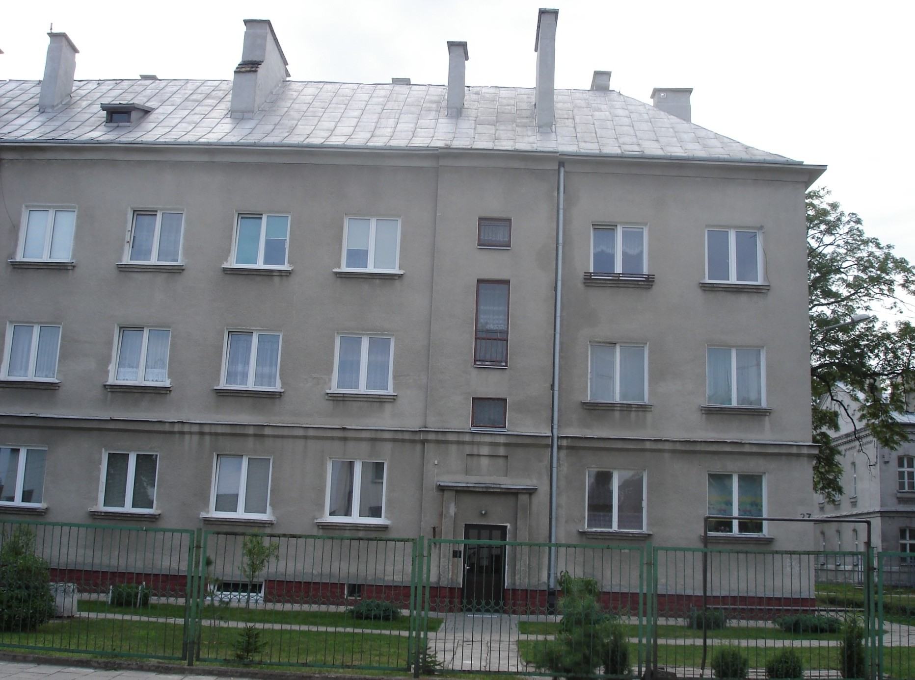 Garnizon Przasnysz, blok nr 27